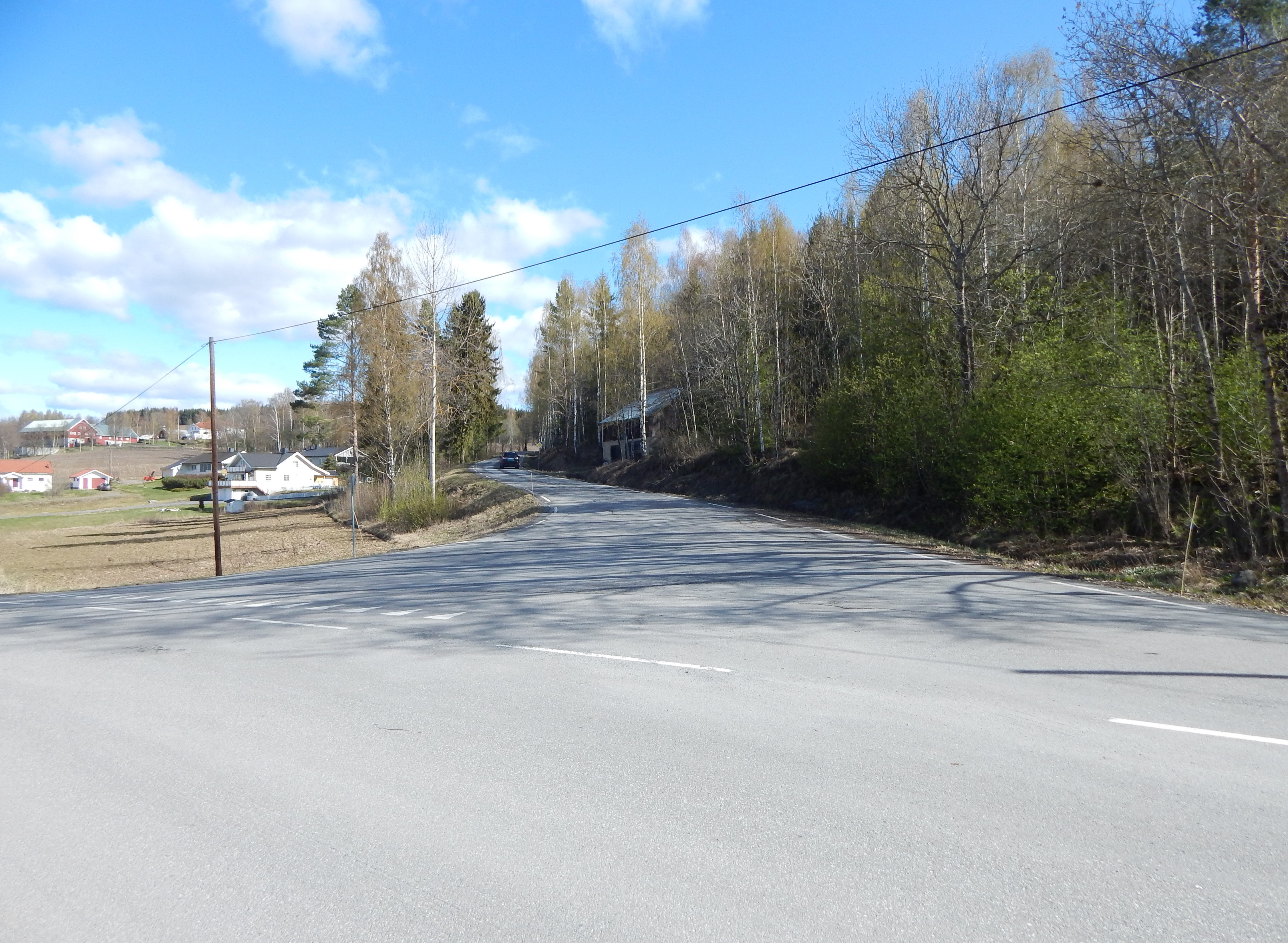 Fylkesvei 1768 tar av fra fylkesvei 1760 ved Taskerud.